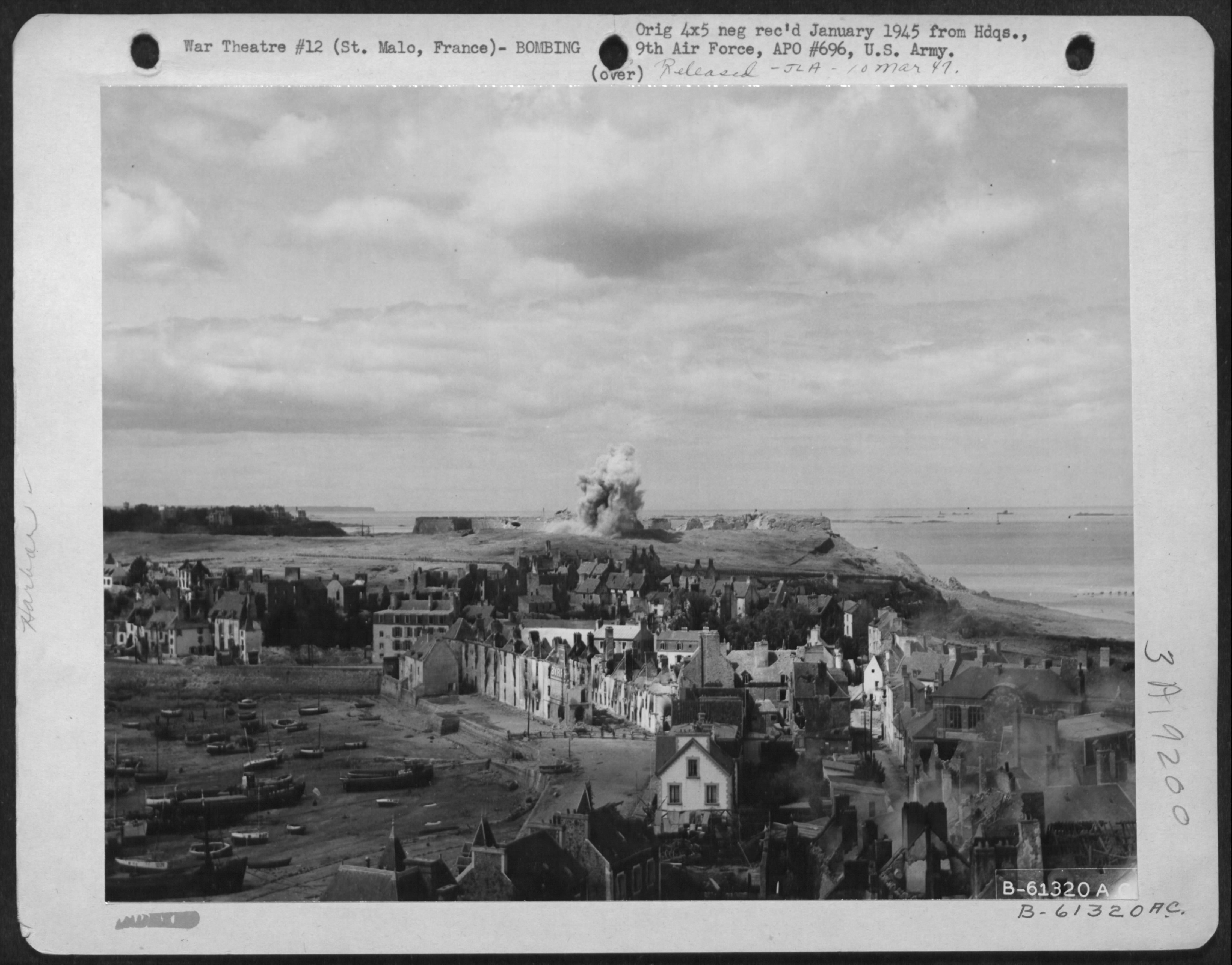 Bombardement de la cité d'Aleth à Saint-Servan (aujourd'hui Saint-Malo) par l'USAAF le 18 août 1944